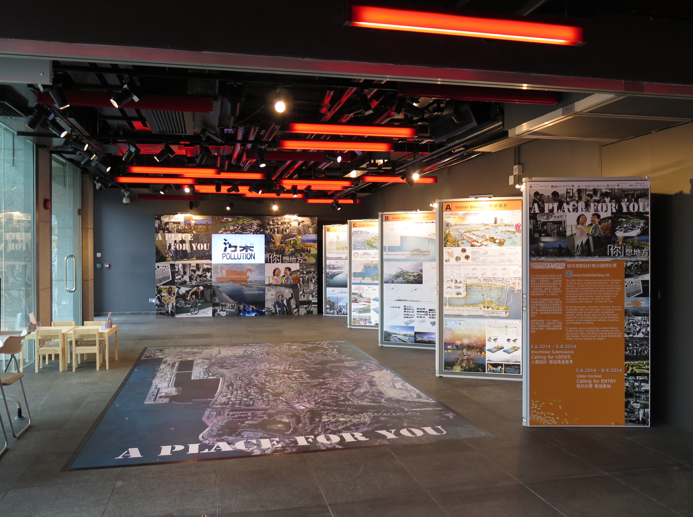 Kai Tak Fantasy Exhibit